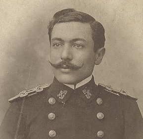 Teniente coronel Lucio Salvadores